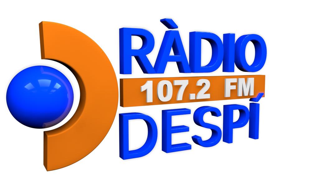 Logo Ràdio Despí